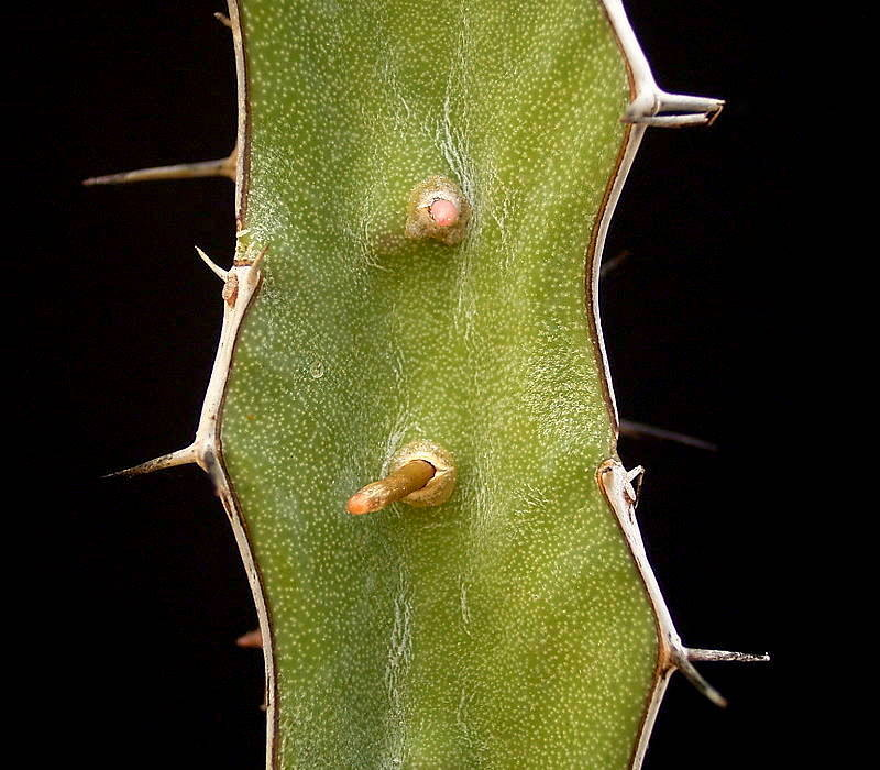 Euphorbia tenuispinosa